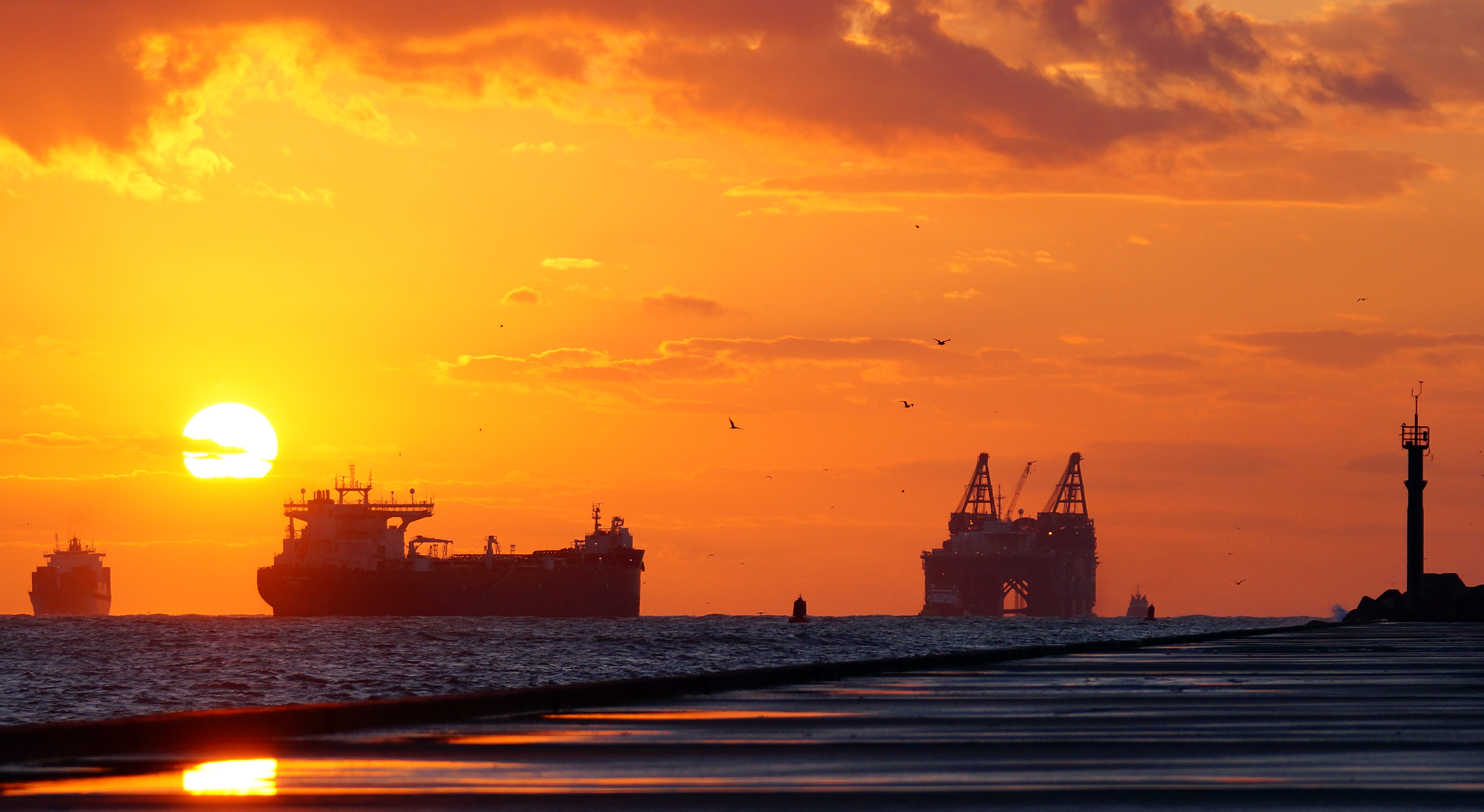 Aankomst THIALF 8-4-2014